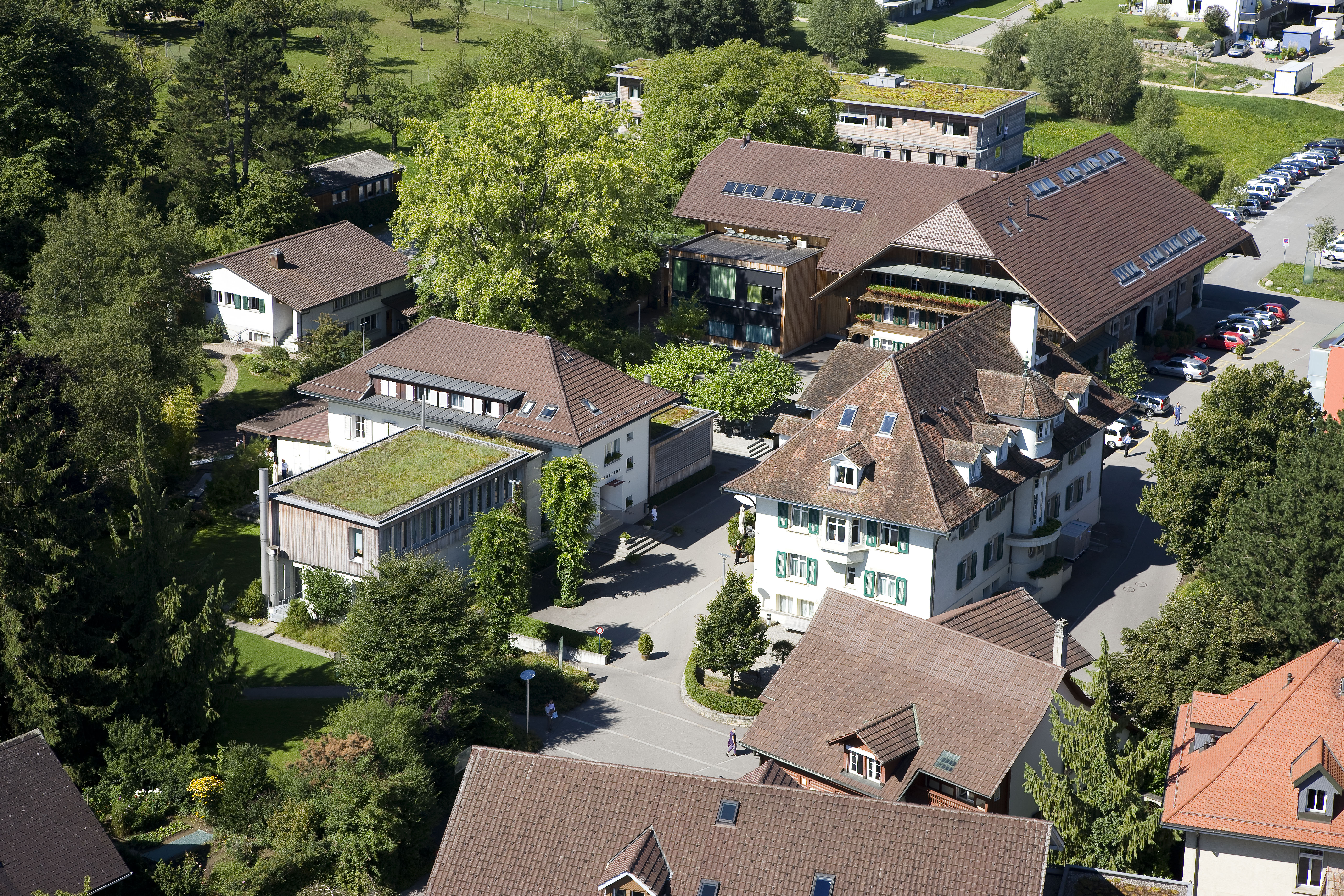 Luftaufnahme des Areals der Privatklinik Wyss, 2008